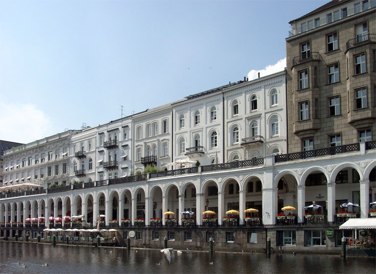 Die Alsterarkaden in Hamburg-Neustadt.